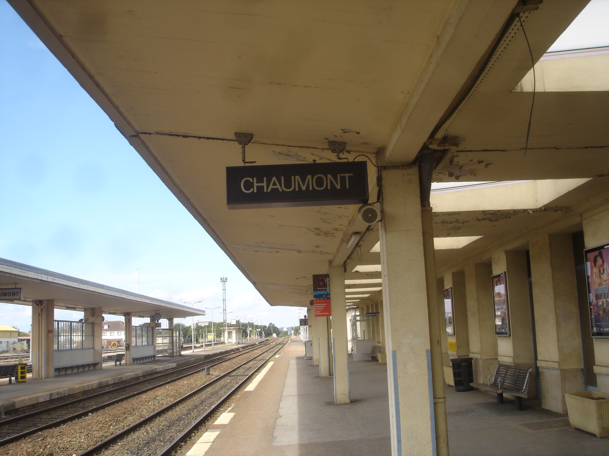 Vue depuis le quai n°1